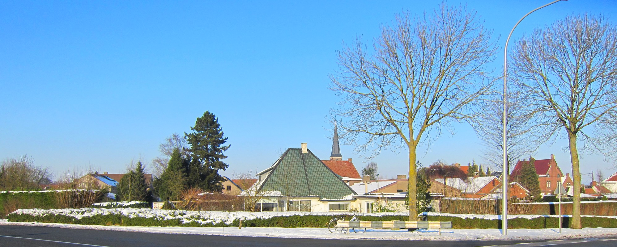 Moen Vlaanderen